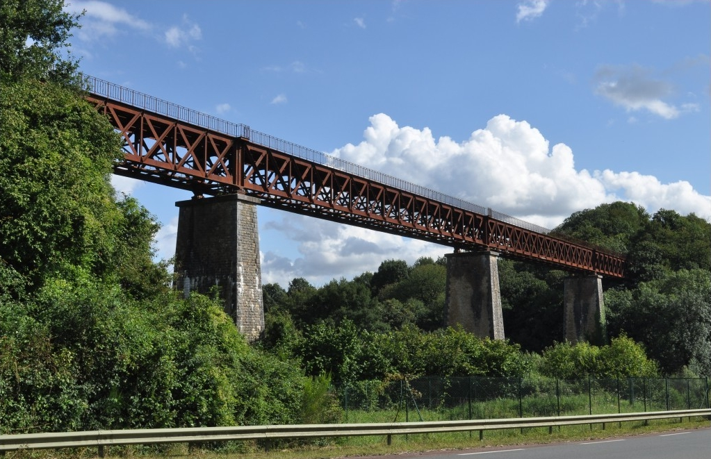 Le viaduc du Baguenard ou du Petit Fougerais vu le 15 août 2014